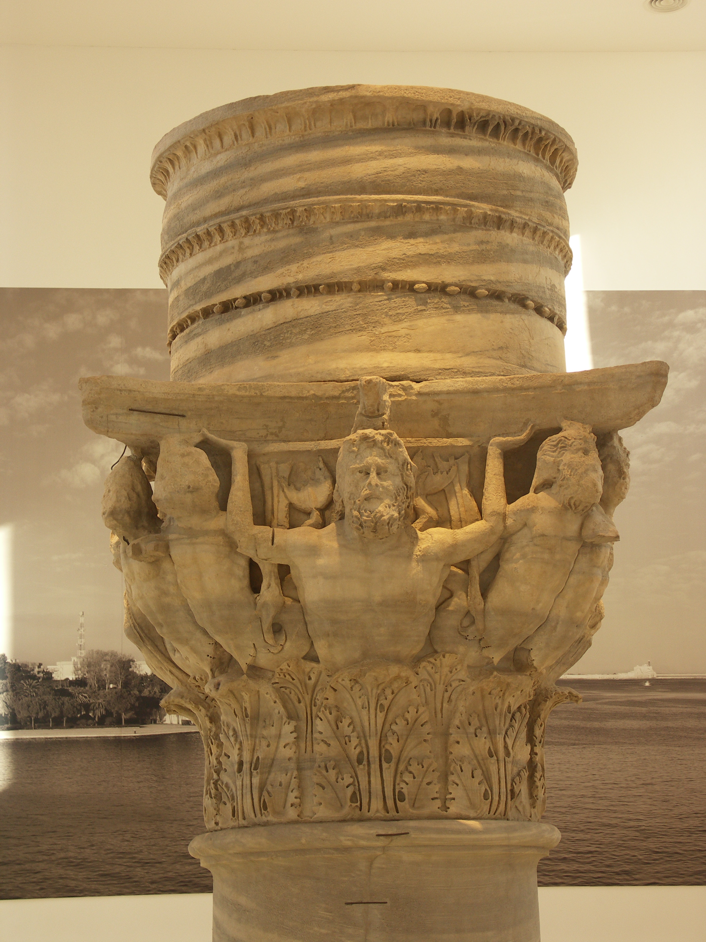 Il capitello originale della colonna di Brindisi, conservato nel Palazzo Nervegna Granafei